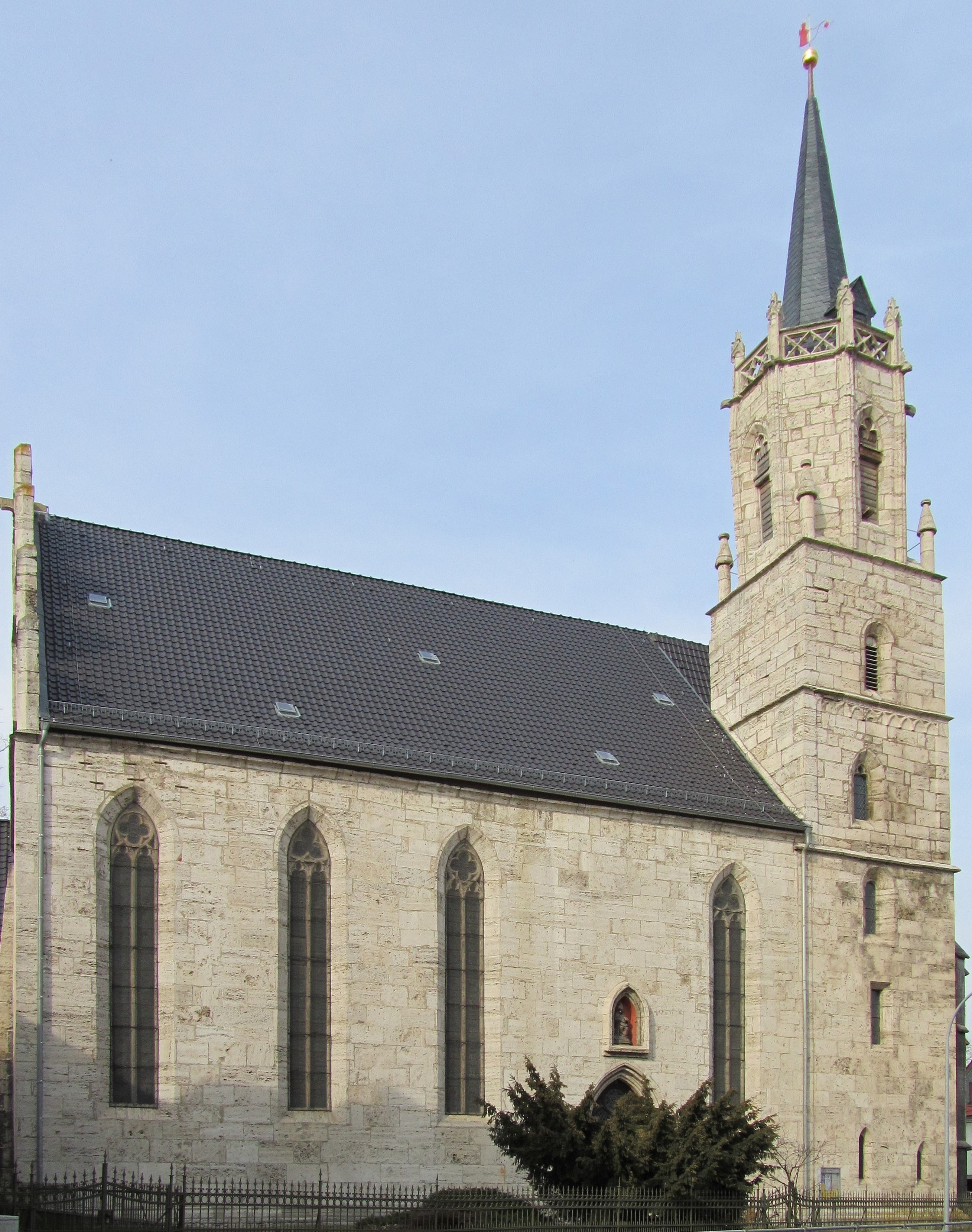 Die Nikolaikirche in Mühlhausen (Thüringen).